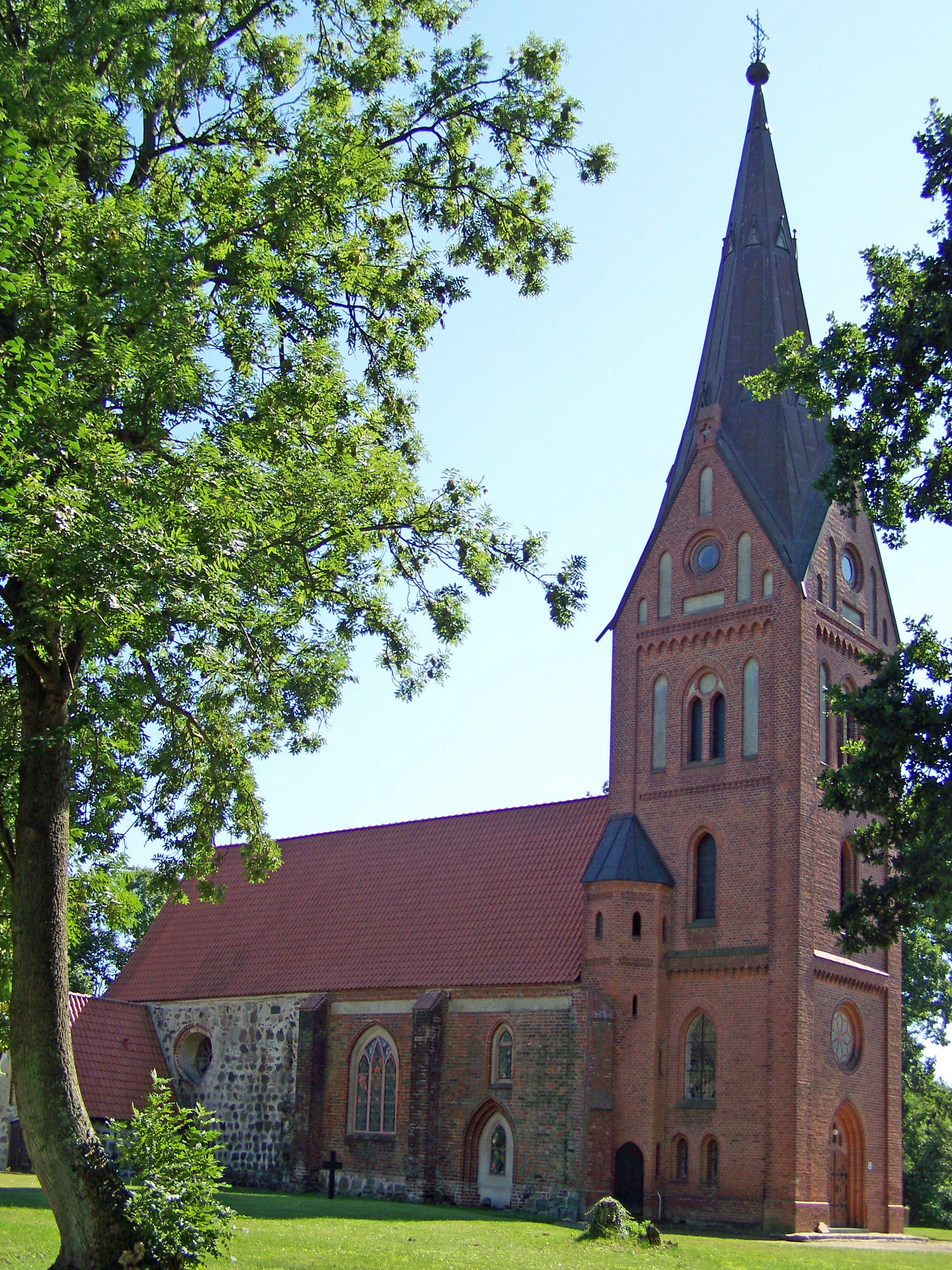 Hanshagen,_Kirche_(2008-08-31)